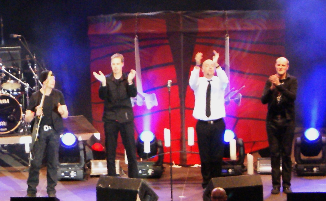 Unheilig auf dem Blackfield 2010